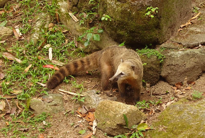 Quati fotografado na Floresta da Tijuca